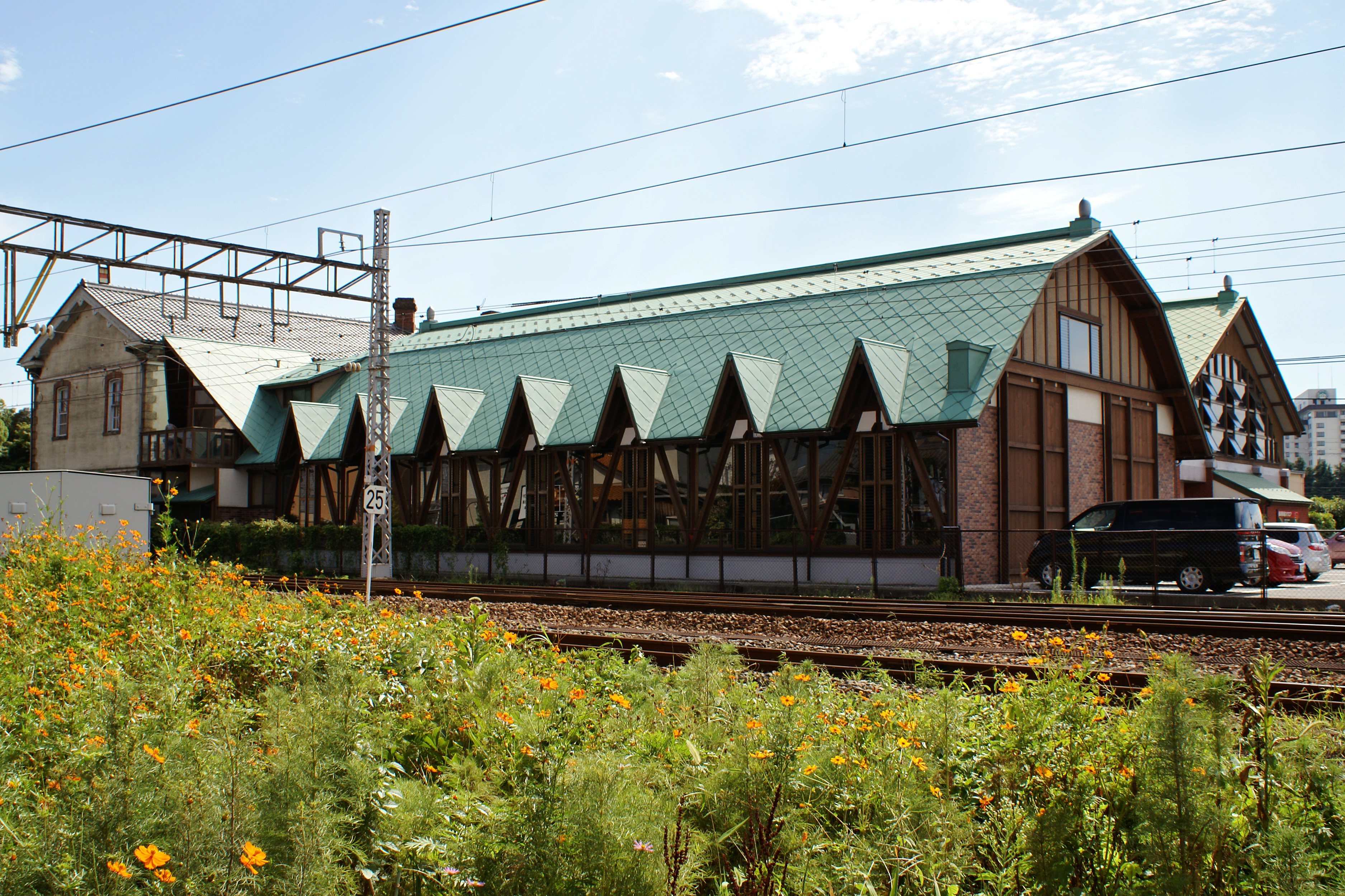 "Nagahama Tetsudo Square" in Nagahama, Shiga